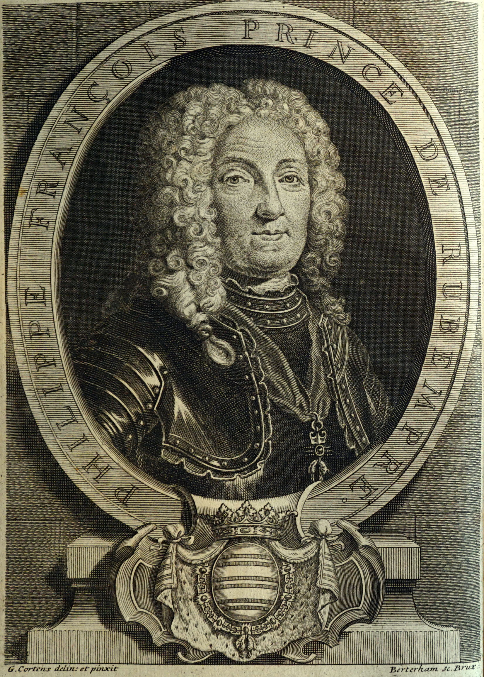 gravure représentant Philippe François de Mérode-Montfort (1669-1742), prince de Rubempré, 653e dans l'ordre de la toison d'or autrichien.